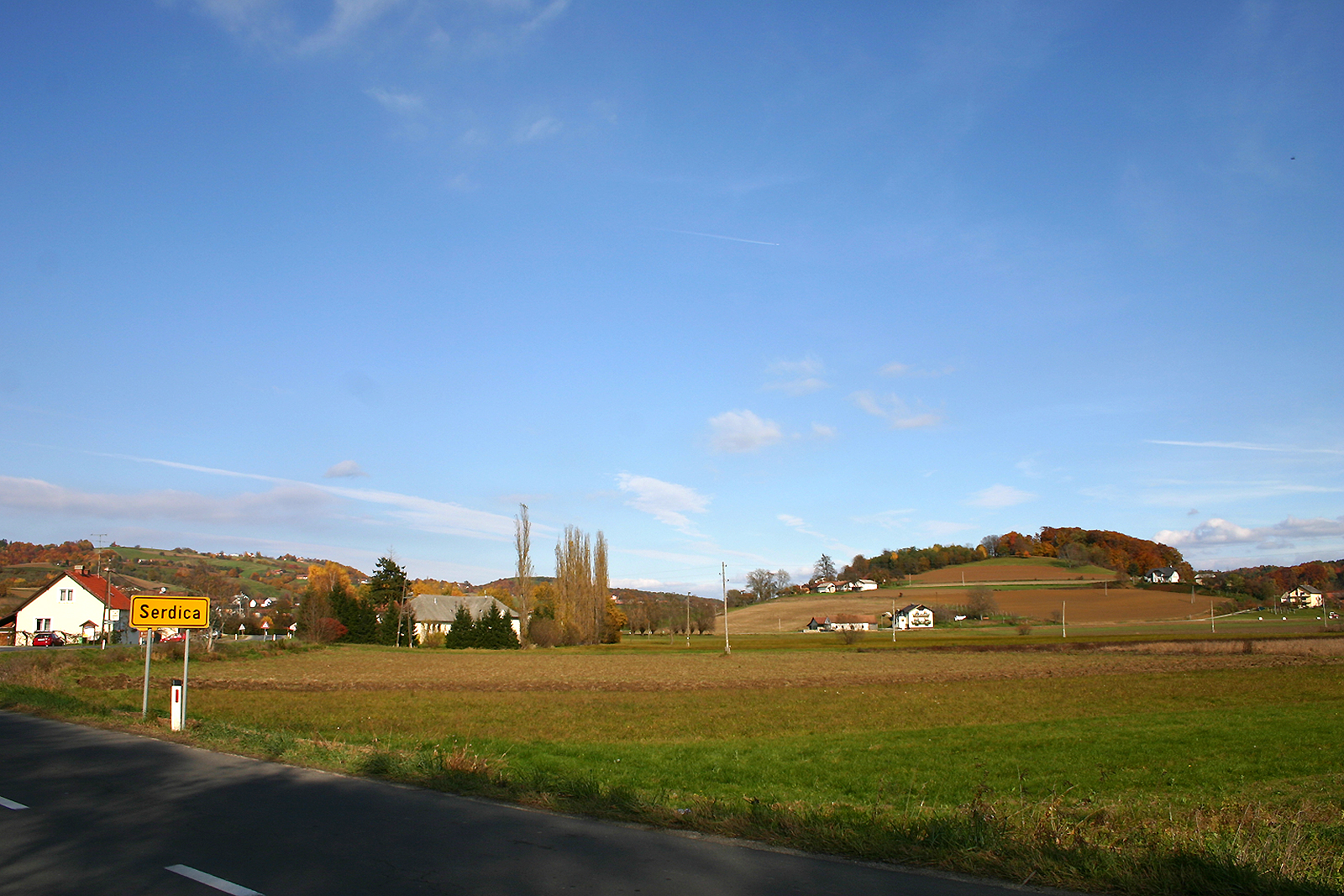 Serdica